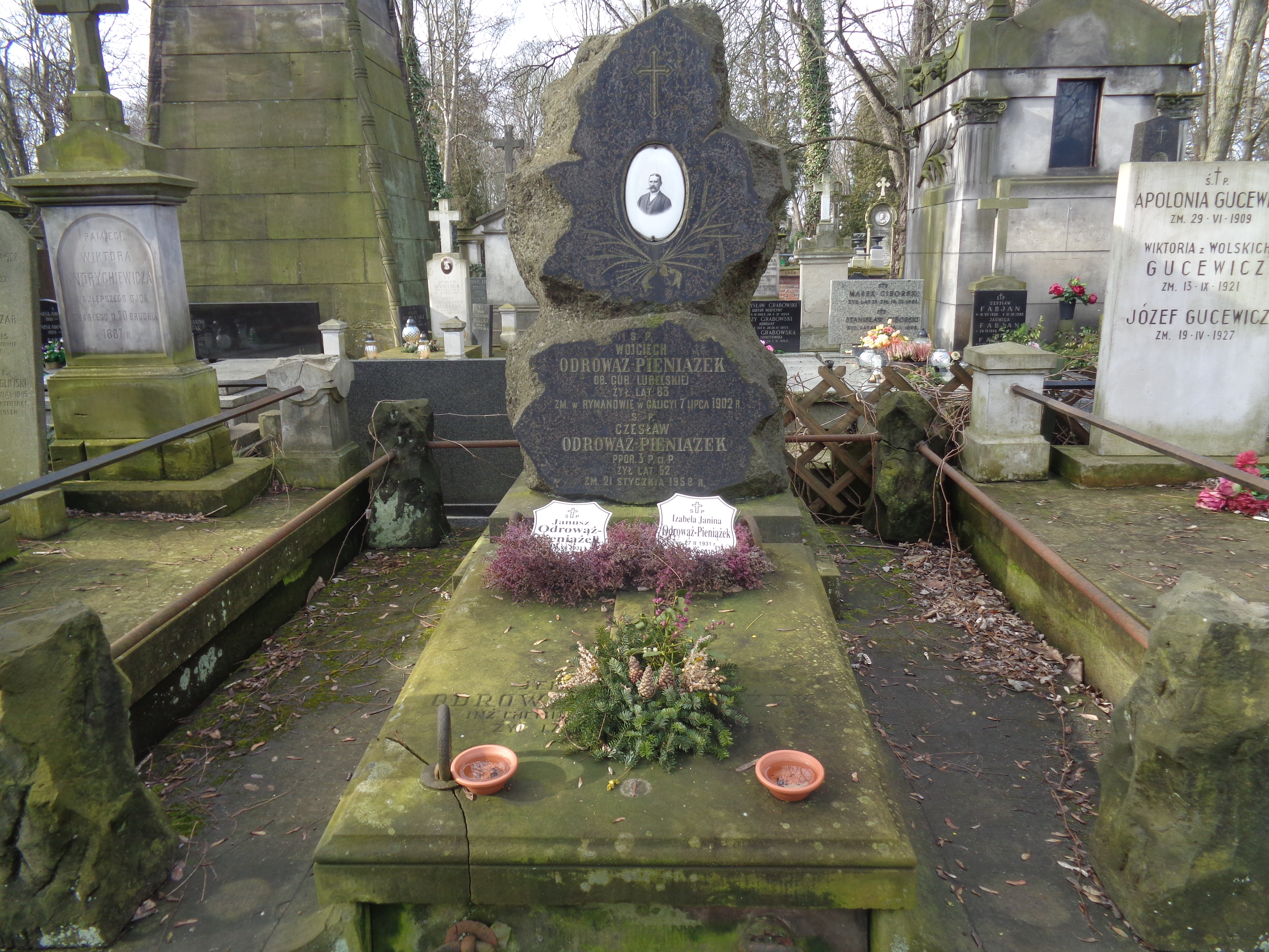 Grób Jerzego Odrowąża-Pieniążka na Cmentarzu Powązkowskim